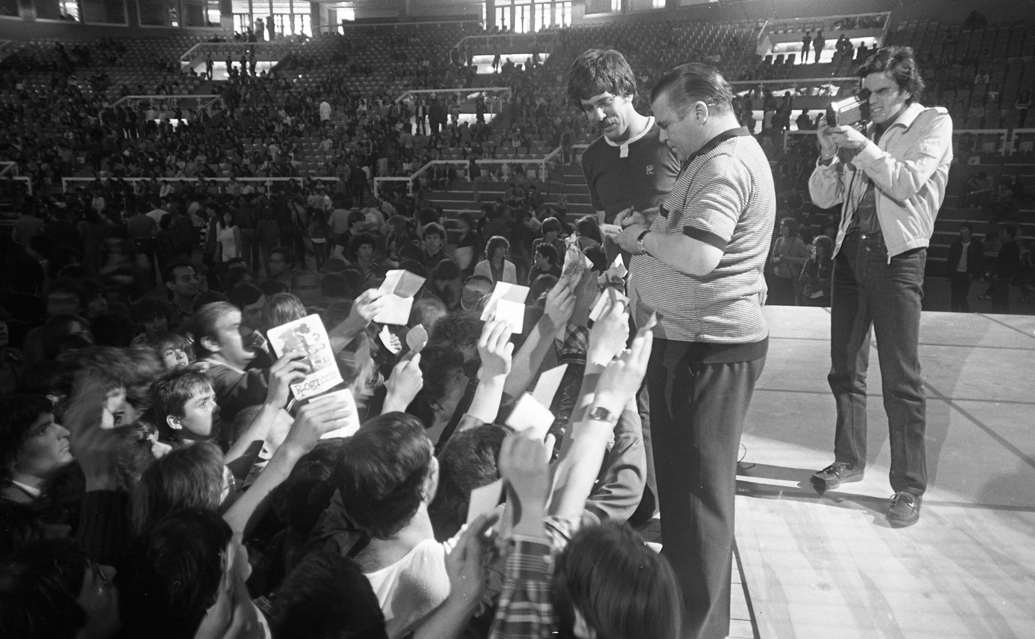 Budapest Sportcsarnok, Puskás Öcsi dedikál, mellette Déri János riporter. Location: Hungary, Budapest XIV. Tags: celebrity, Budapest Title: Budapest Sportcsarnok, Puskás Öcsi dedikál, mellette Déri János riporter.